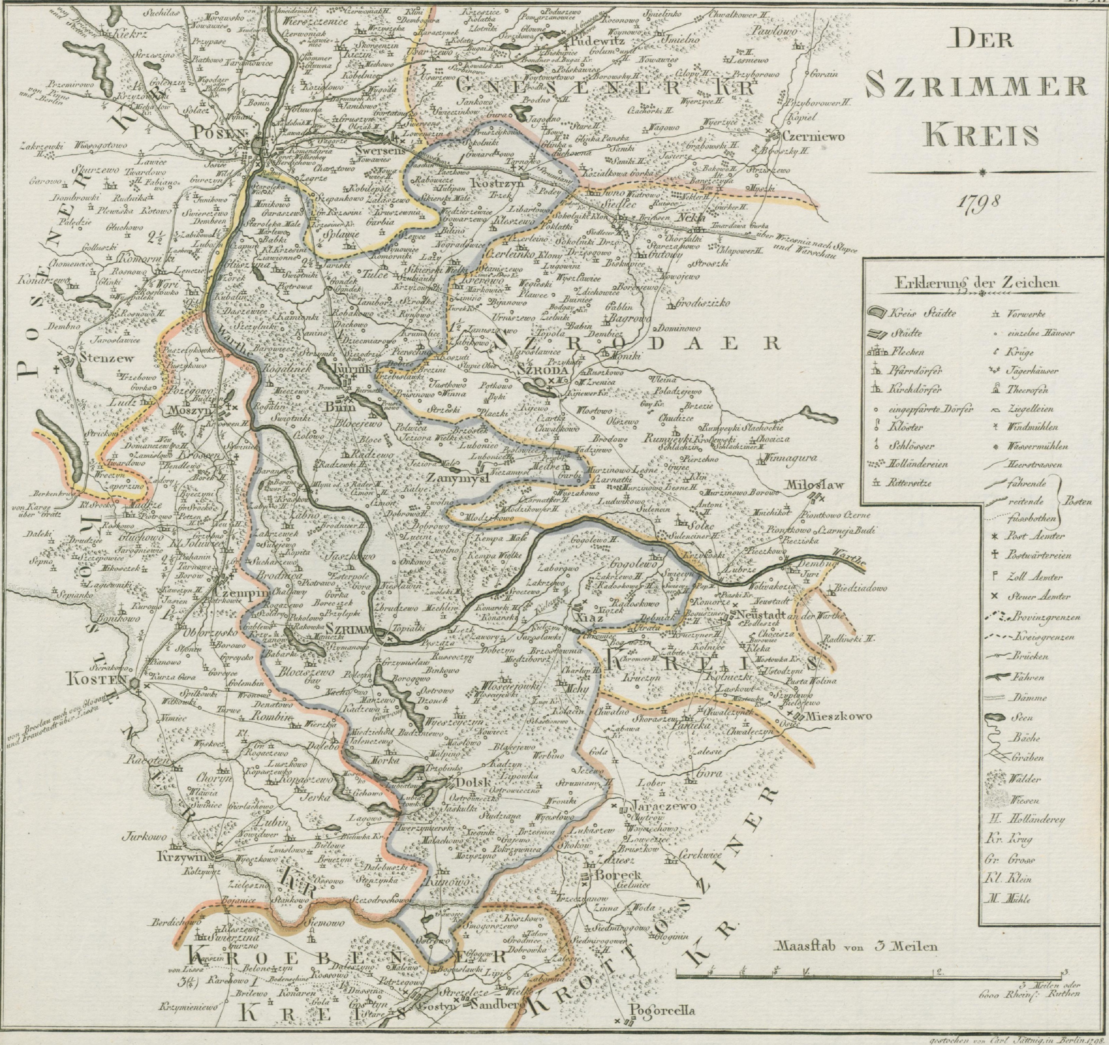 Map of "Kreis Schrimm" as of 1798